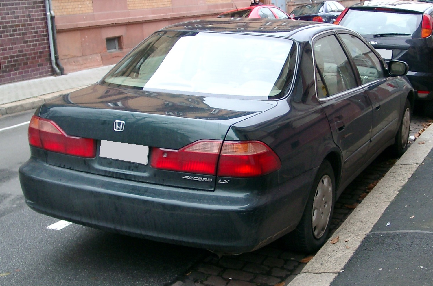 Honda Accord, 6. Generation